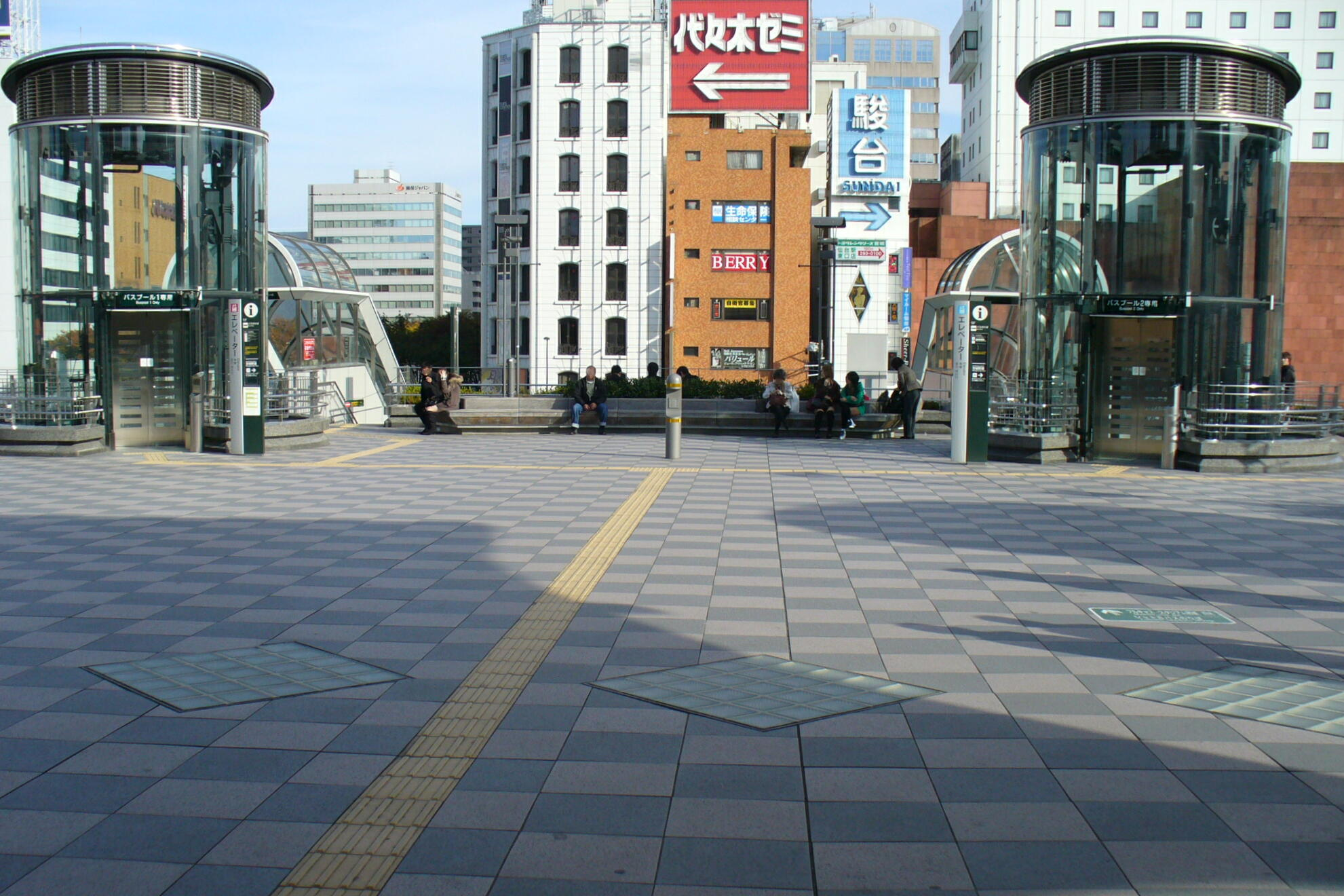 仙台駅（東口）